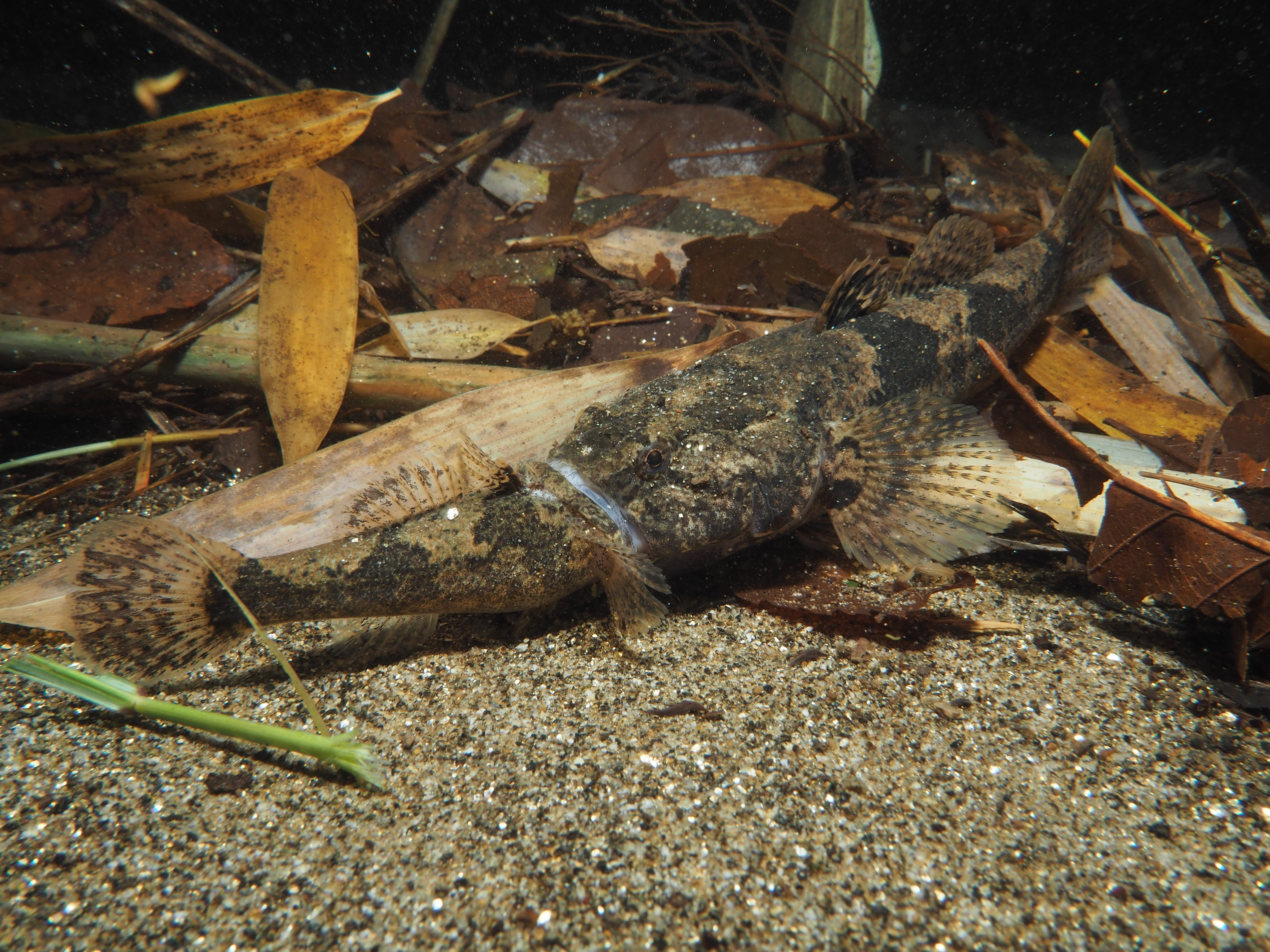 ドンコを喰らうドンコ。熊本県球磨川水系の夜の小河川にて。詳細